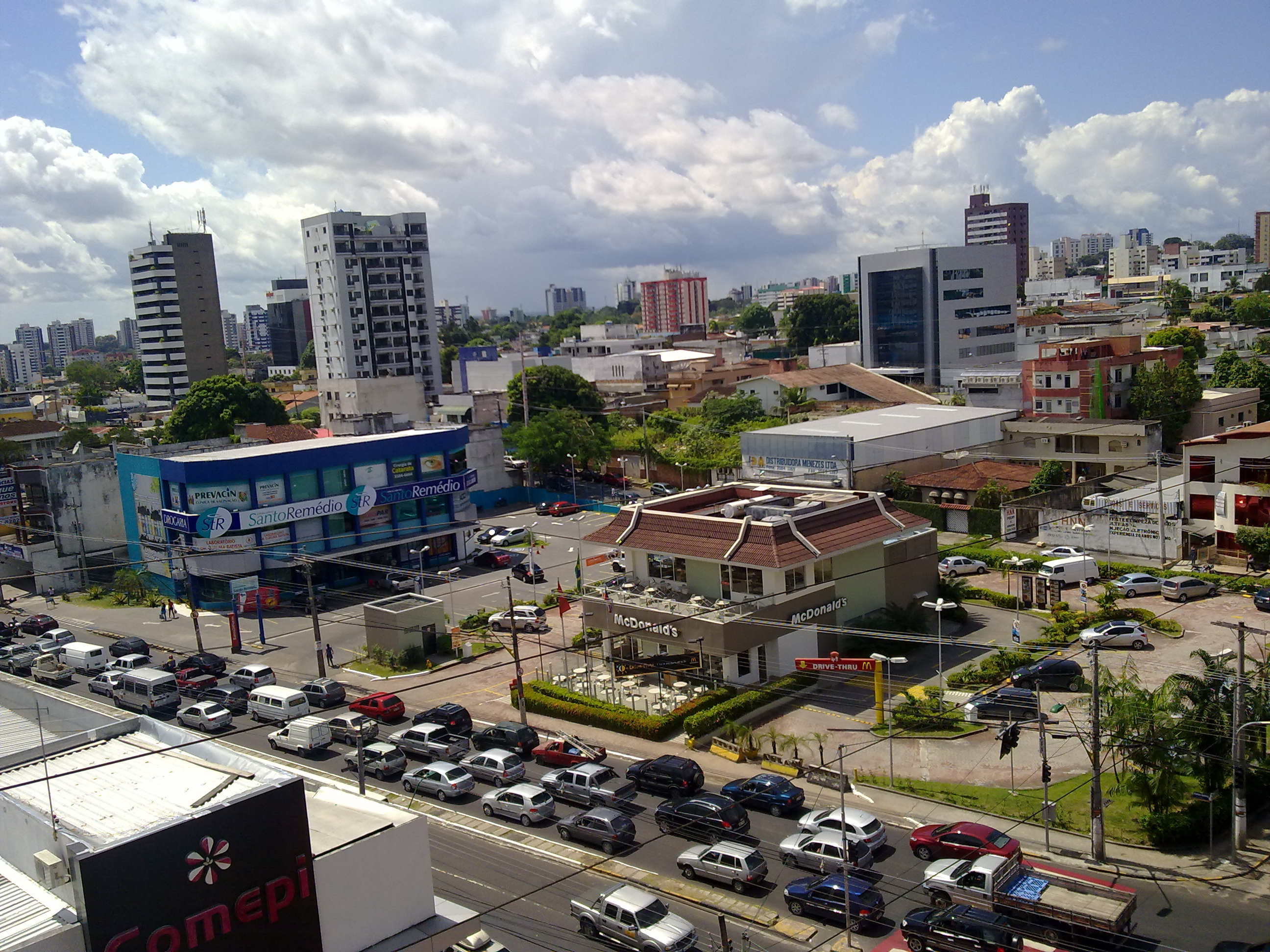 Bairro de Vieiralves em Manaus